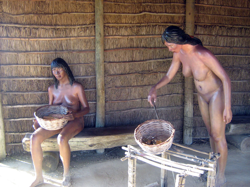 Mujeres indígenas en el Muelle de las Carabelas